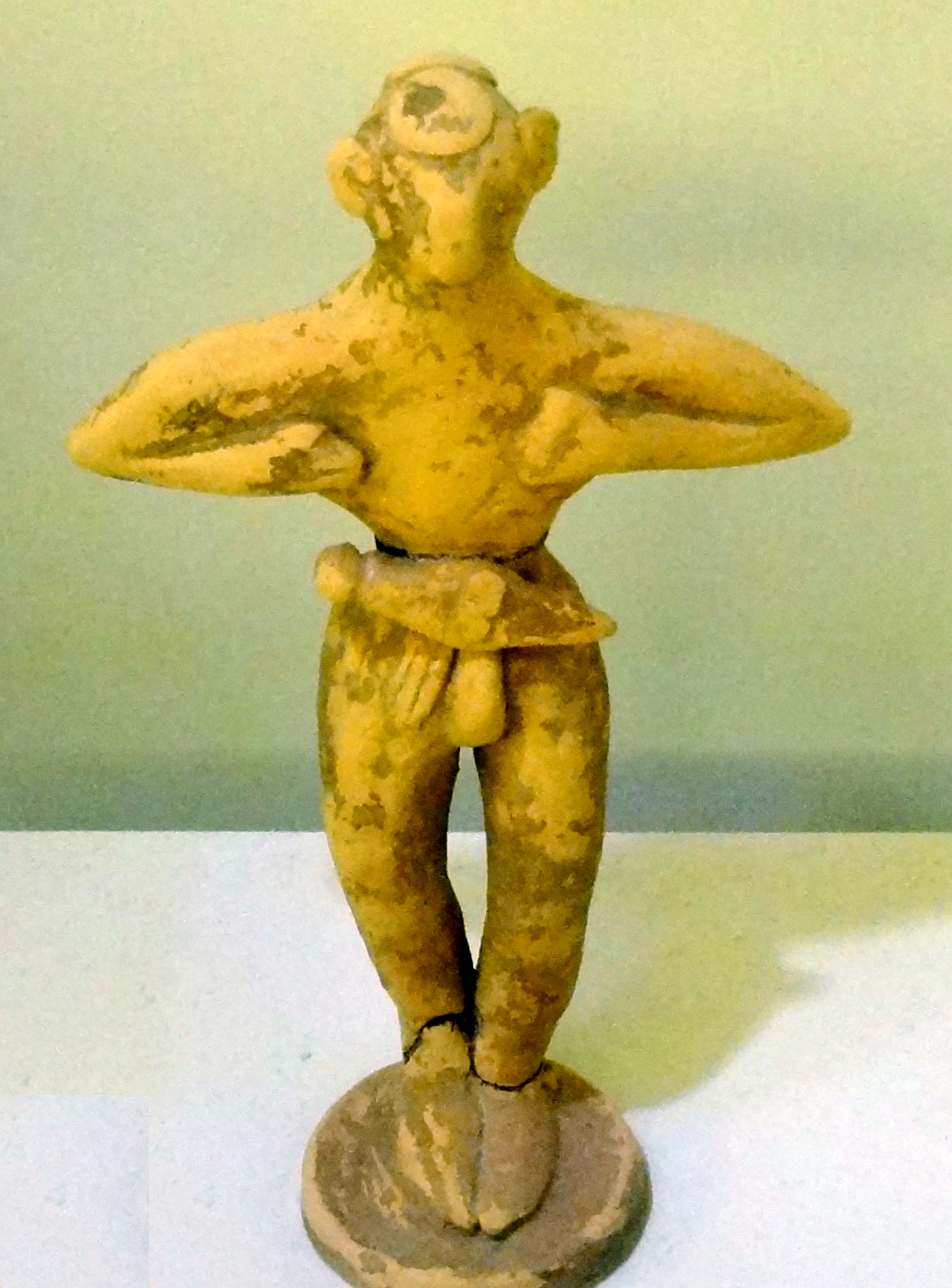 Eine männliche Figur (Altpalastzeit, 1900–1700 v. Chr.) aus dem Höhenheiligtum von Petsophas (Palekastro), ausgestellt im Archäologischen Museum Iraklio, Kreta, Griechenland (Bildausschnitt).